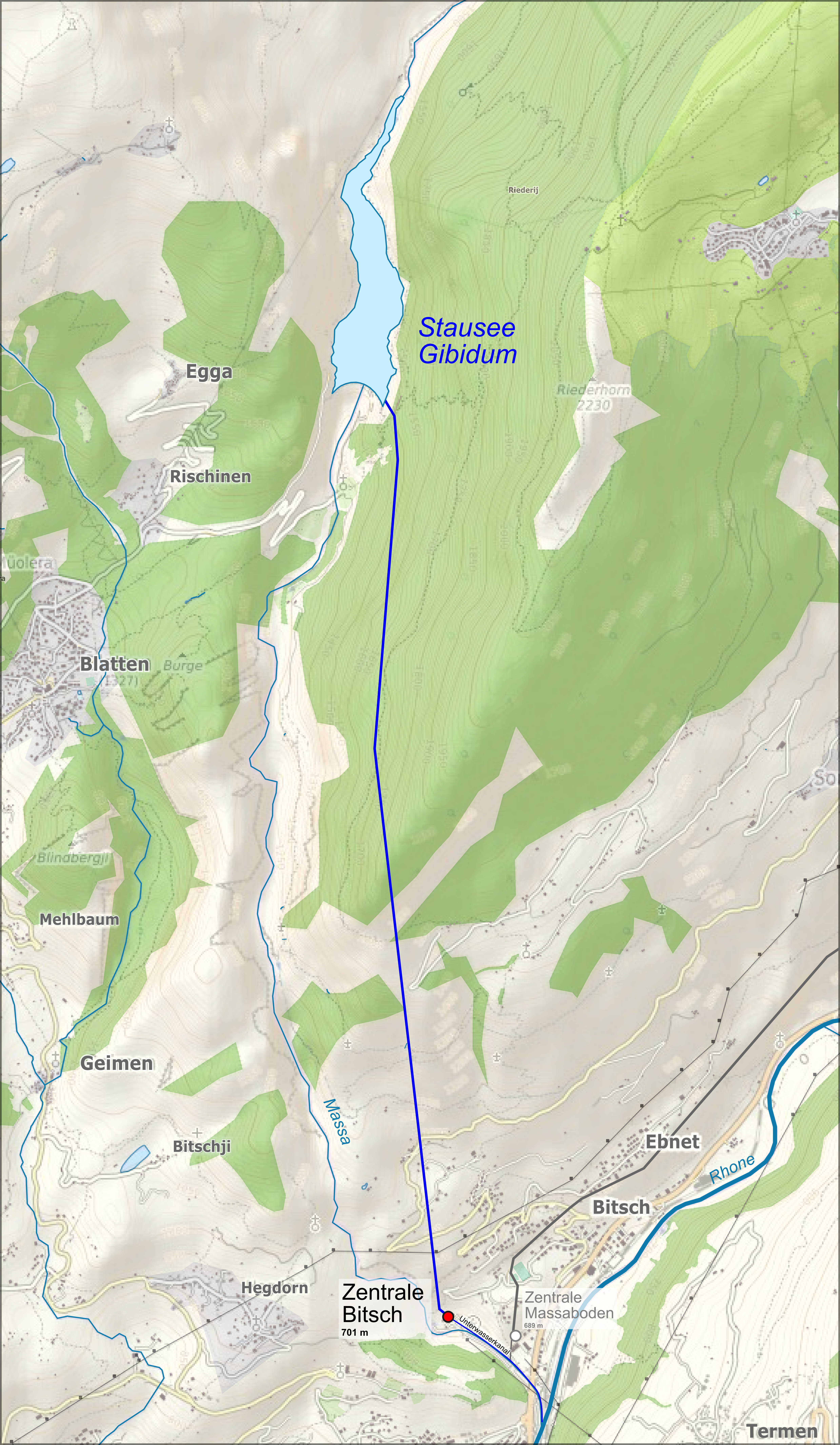 Lagekarte des Kraftwerks Electra-Massa